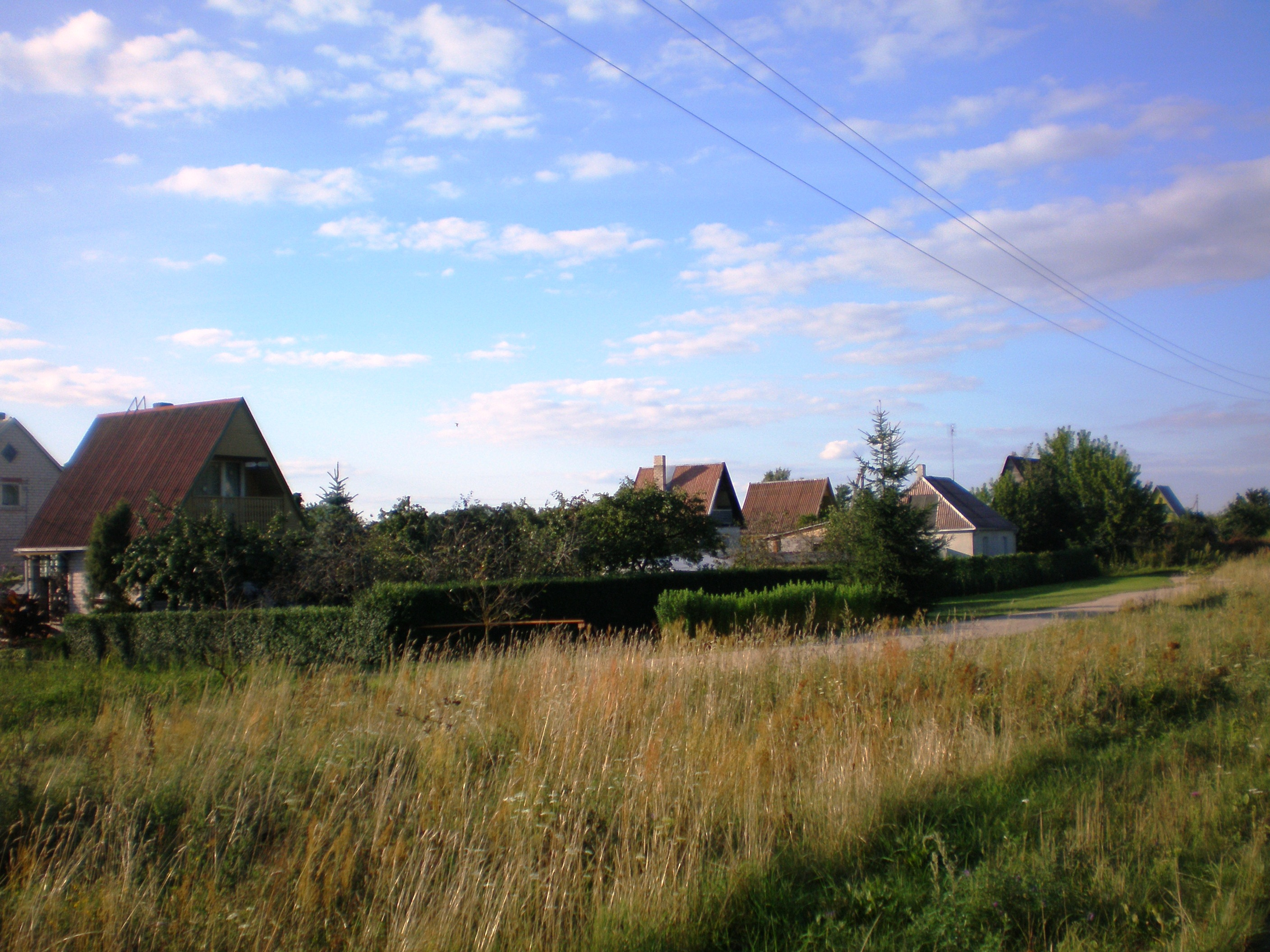 Localidad de Pašiliai en Municipio de Kėdainiai, Lituania